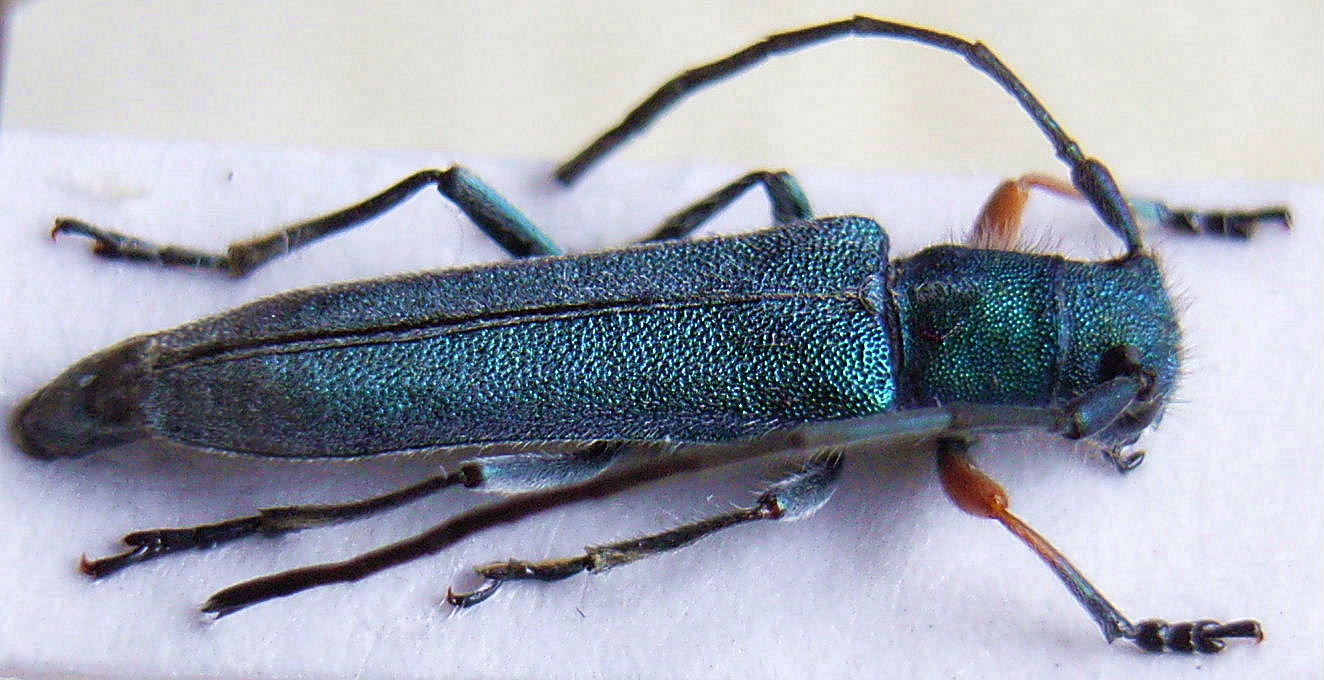 Species Phytoecia caerulea